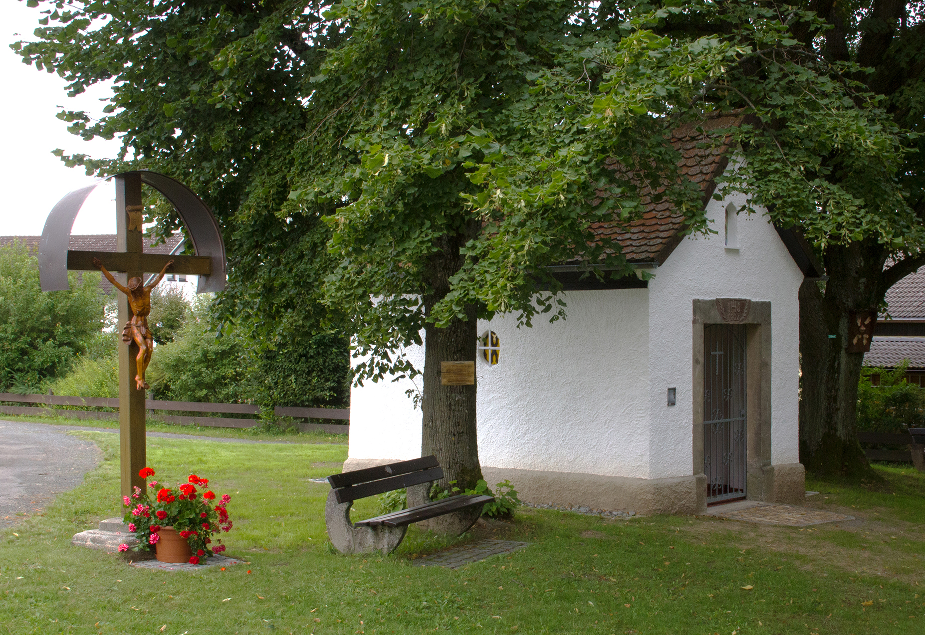 Nordostansicht des Ensembles aus Feldkruzifix, Spruchtafel, Sebastian-Kapelle und Fünf-Wunden-Tafel (rechter Bildrand, an der Linde) im August 2017